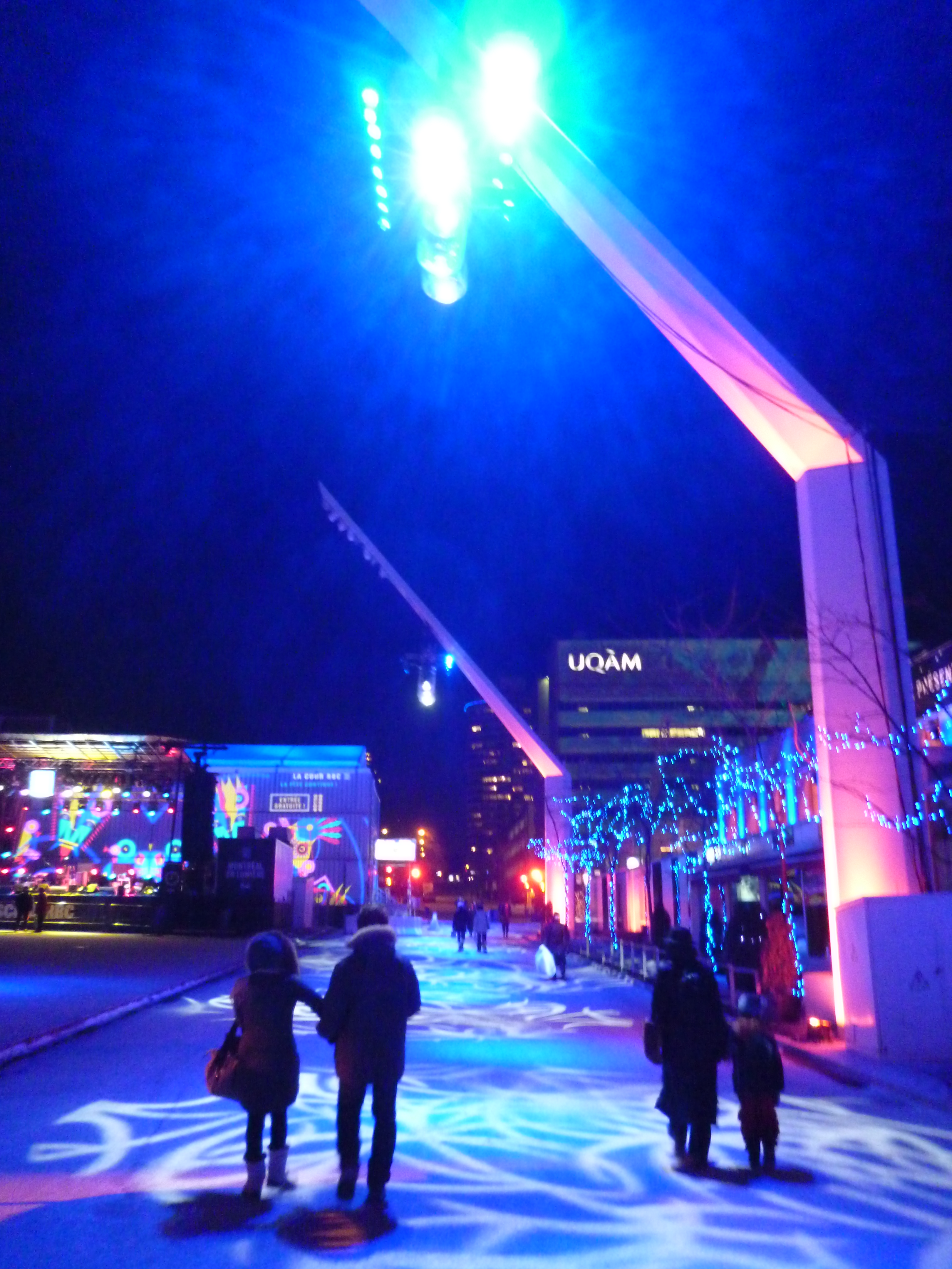 Centre-ville de Montréal, lors de Montréal en lumière.